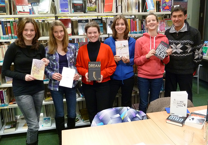 Foto der AG LJBP 2011